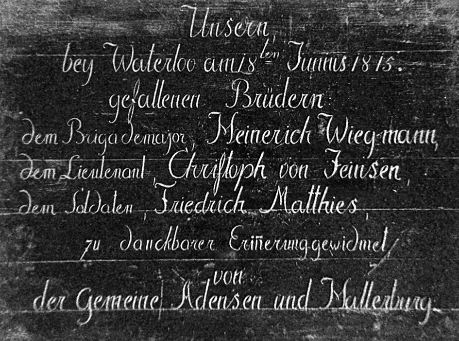 Gedenktafel für die in der Schlacht bei Waterloo am 18. Juni 1815 Gefallenen zur Aufbewahrung in der St. Dionysiuskirche in Adensen. Der Brigademajor Hein(e)rich Wiegmann war der Vater von Rudolf Wiegmann. Der Verbleib der Gedenktafel ist nicht bekannt.